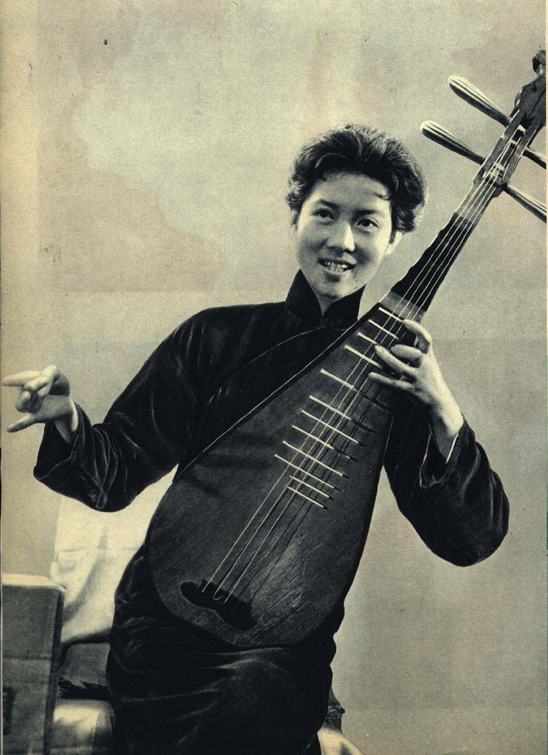 1962-07 1962年 评弹 刘韵若